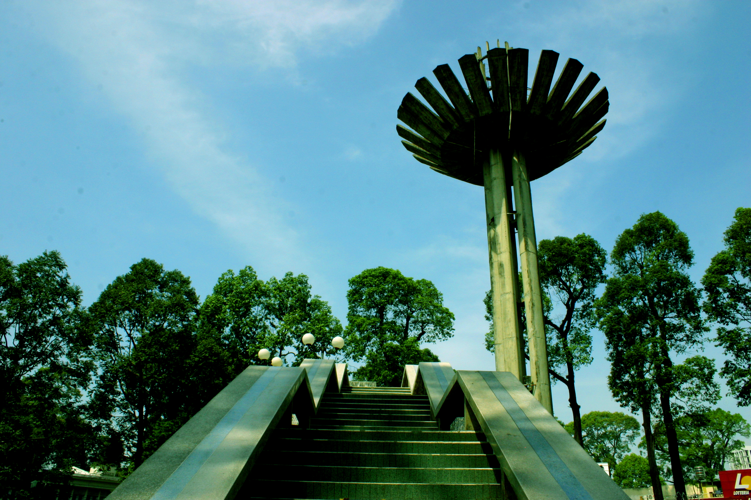 Kia là thang và kia là gươm